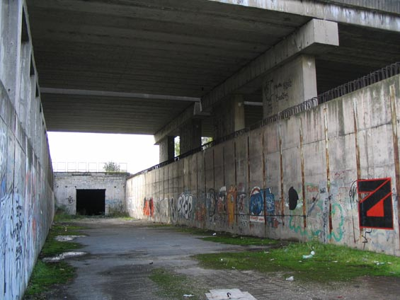 Basement of Bratislava Tube (metro) depot Janikov Dvor, build in 80's.